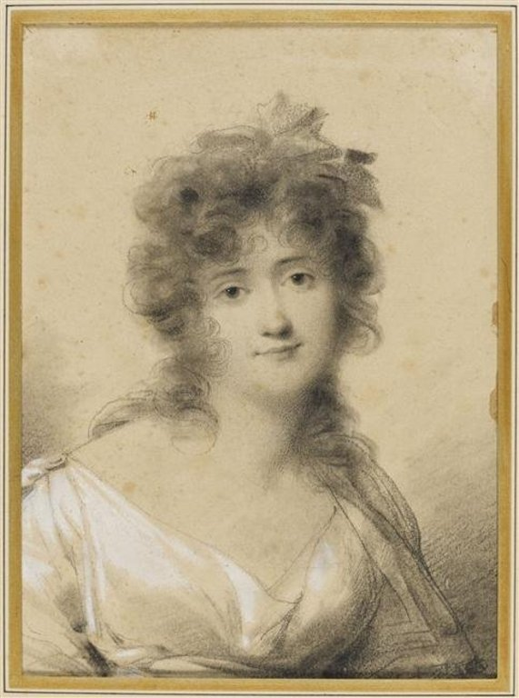 Marie Françoise Sophie Nichault de la Valette, épouse Gay